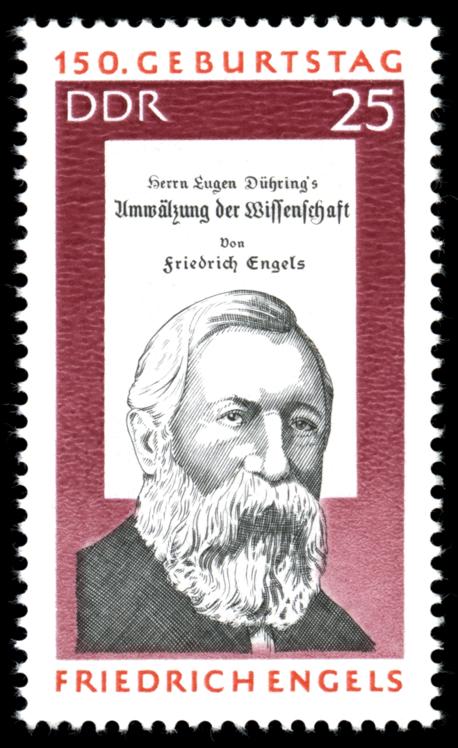 Information: 150. Geburtstag von Friedrich Engels: F.Engels, Titel seines Werkes Anti-Dühring Ausgabepreis: 25 Pfennig First Day of Issue / Erstausgabetag: 24. November 1970 Auflage: 2.000.000 Entwurf: Gerhard Stauf Druckverfahren: Stichtiefdruck und Rastertiefdruck Michel-Katalog-Nr: Ländercode-MiNr: 1624